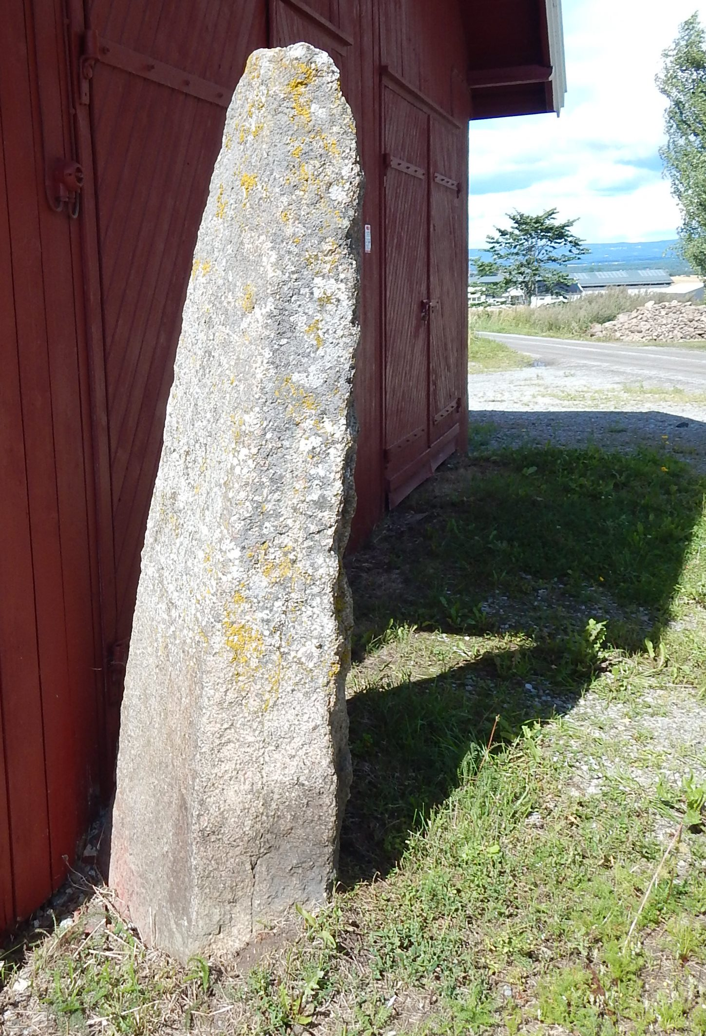 Bautastein på Bryni nordre